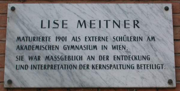 Gedenktafel für Lise Meitner am Wiener Akademischen Gymnasium